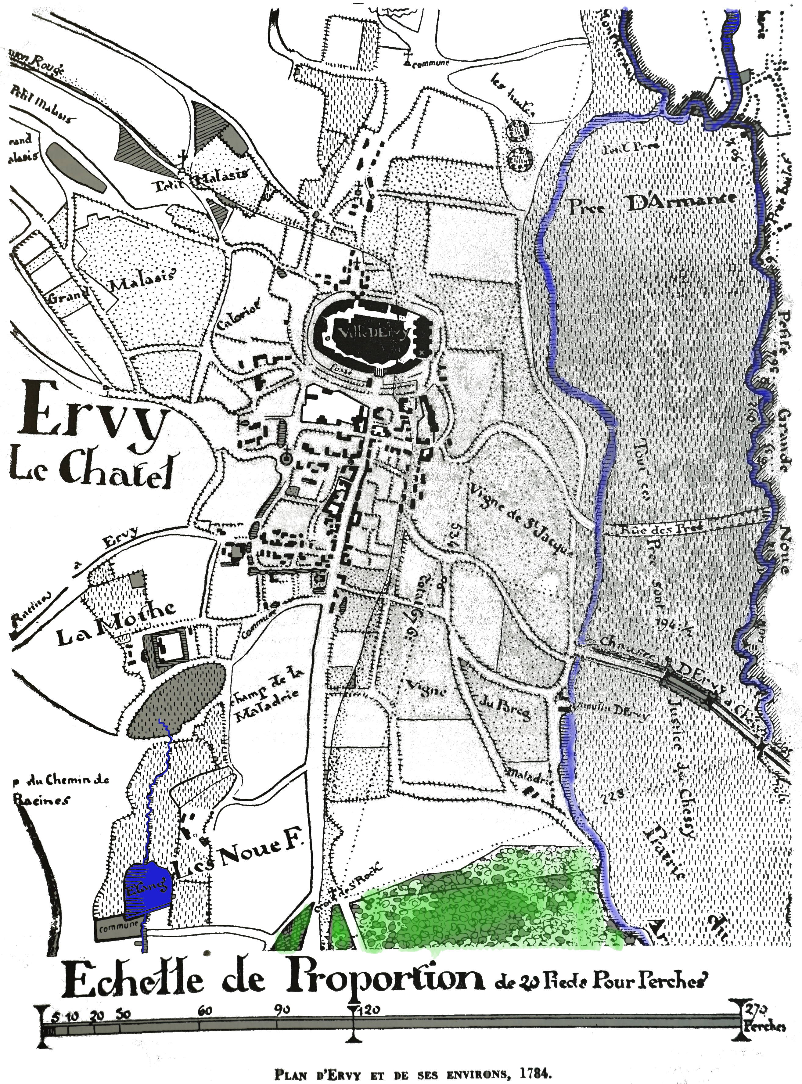 carte issue du fonds de s archives départementaels de l'aube.